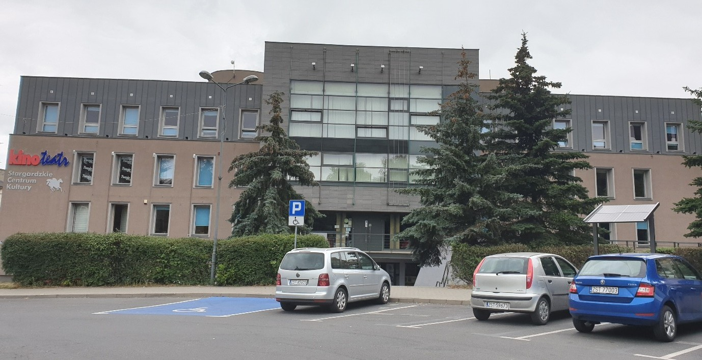 Stargard. Stargardzkie Centrum Kultury